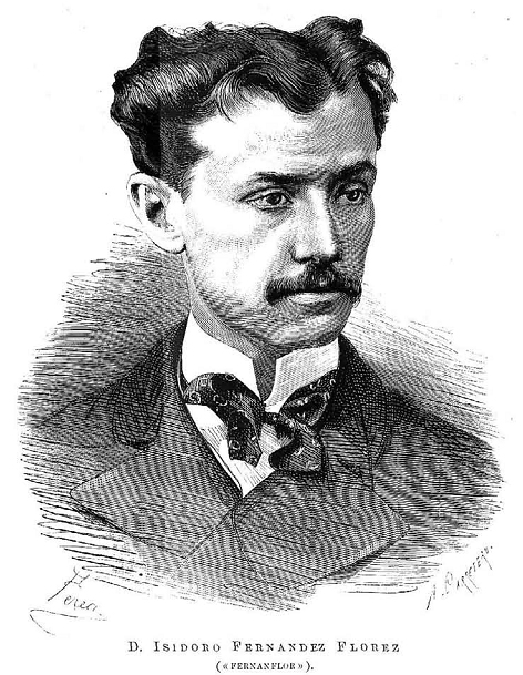 Retrato de Isidoro Fernández Flórez, en La Ilustración Española y Americana.